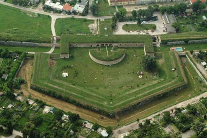 Castle - Komárno - Slovakia - Europe